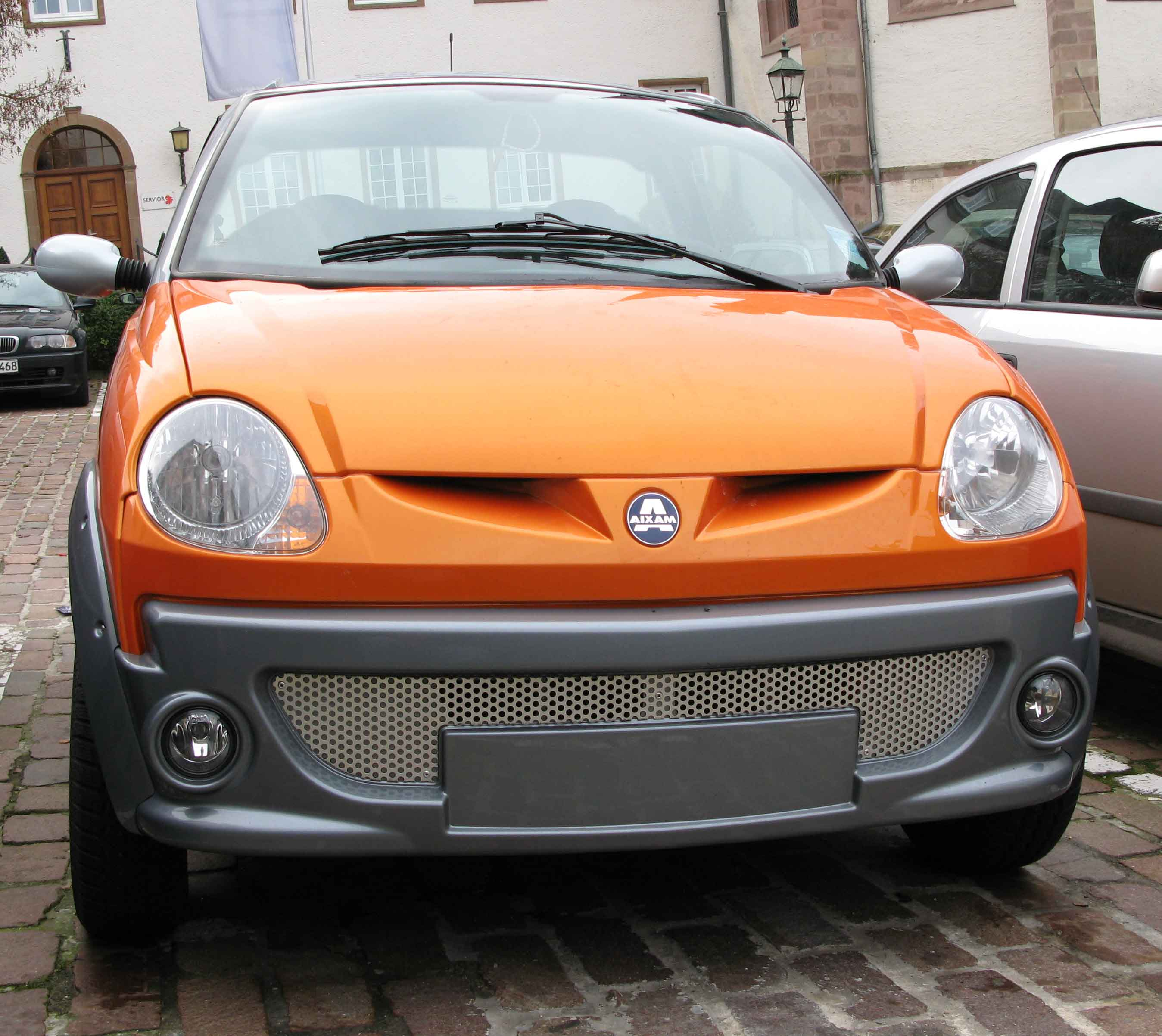 Aixam Scouty.